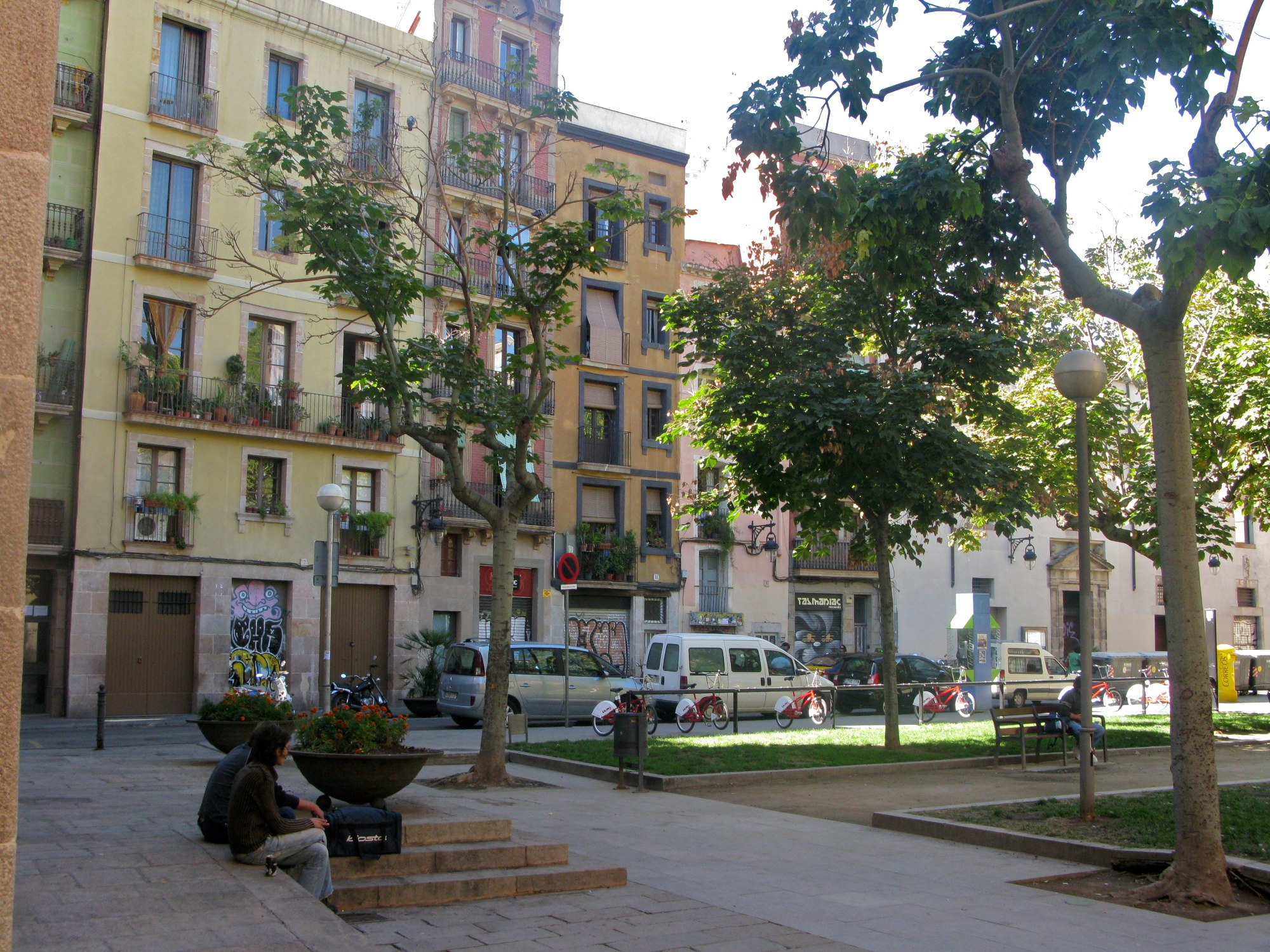 Barcelona El Raval 2